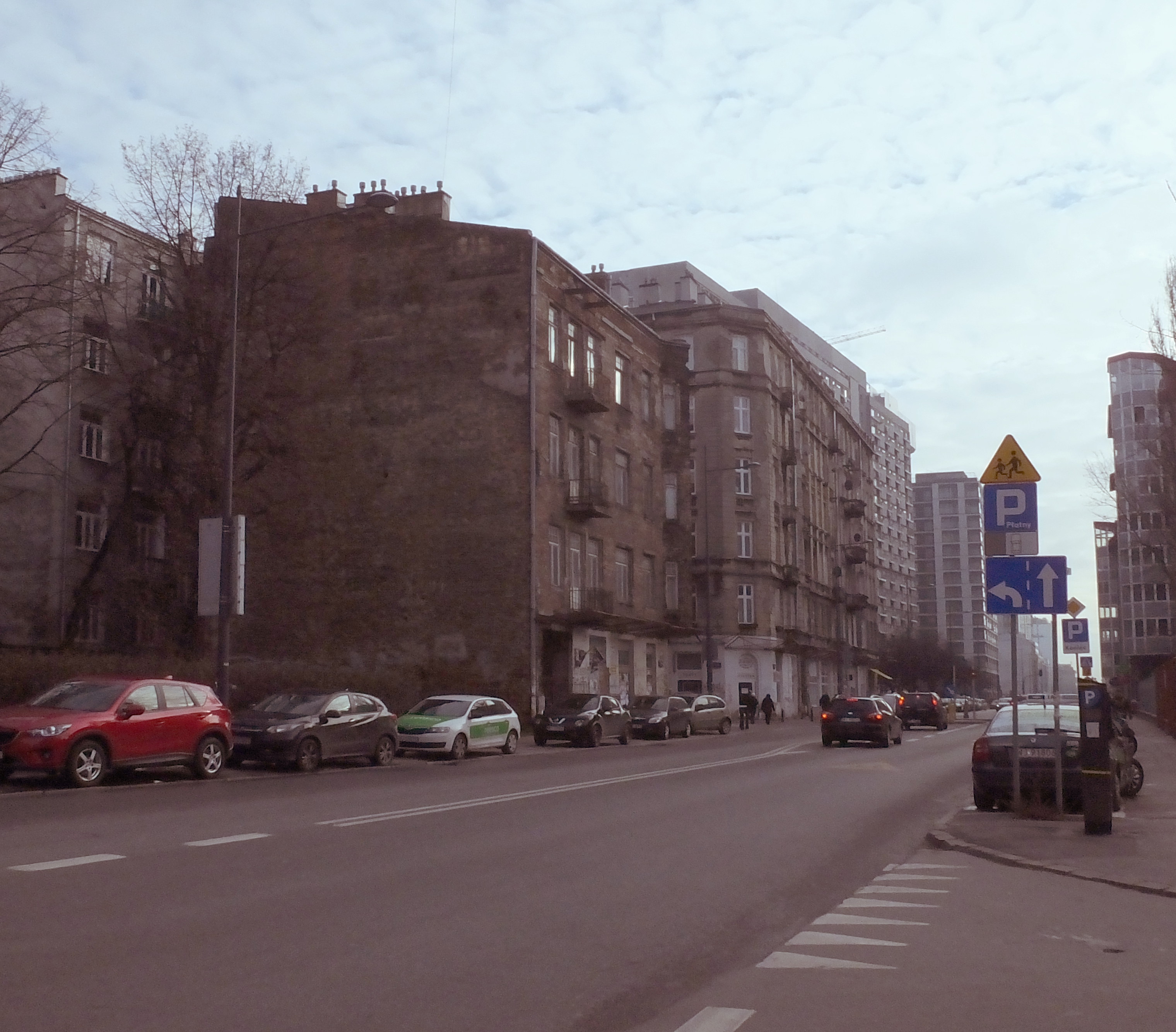 Kamienice w Warszawie przy Żelaznej 64 i 66